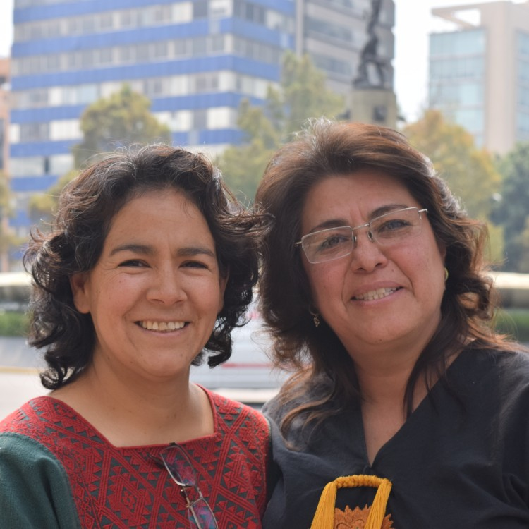 Lol Kin Castañeda y Judith Vázquez activistas del matrimonio igualitario en la Ciudad de México.